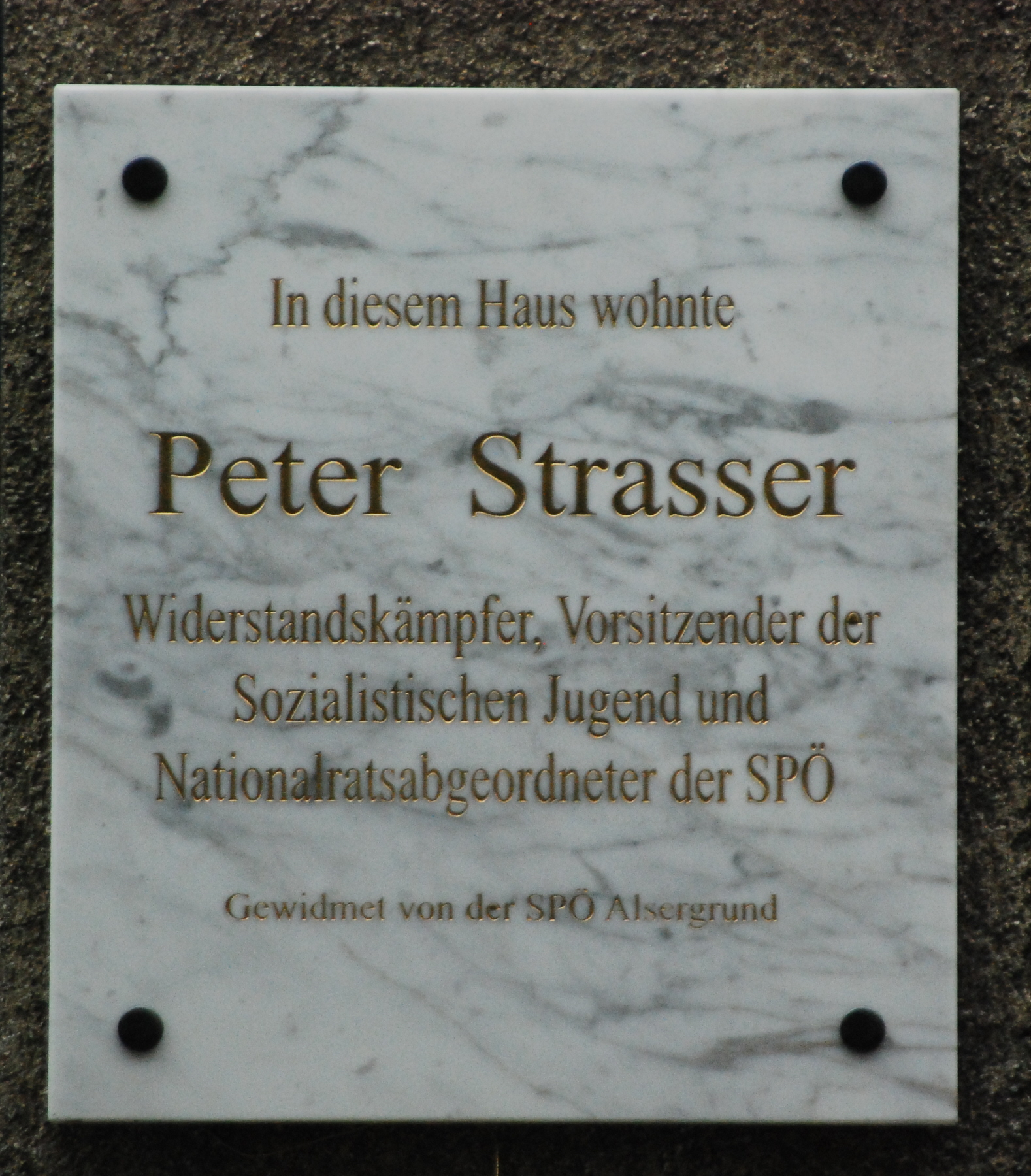 Die Gedenktafel für Peter Strasser wurde am 3. Juli 2012 am Haus Meynertgasse 3 in Wien-Alsergrund feierlich enthüllt.